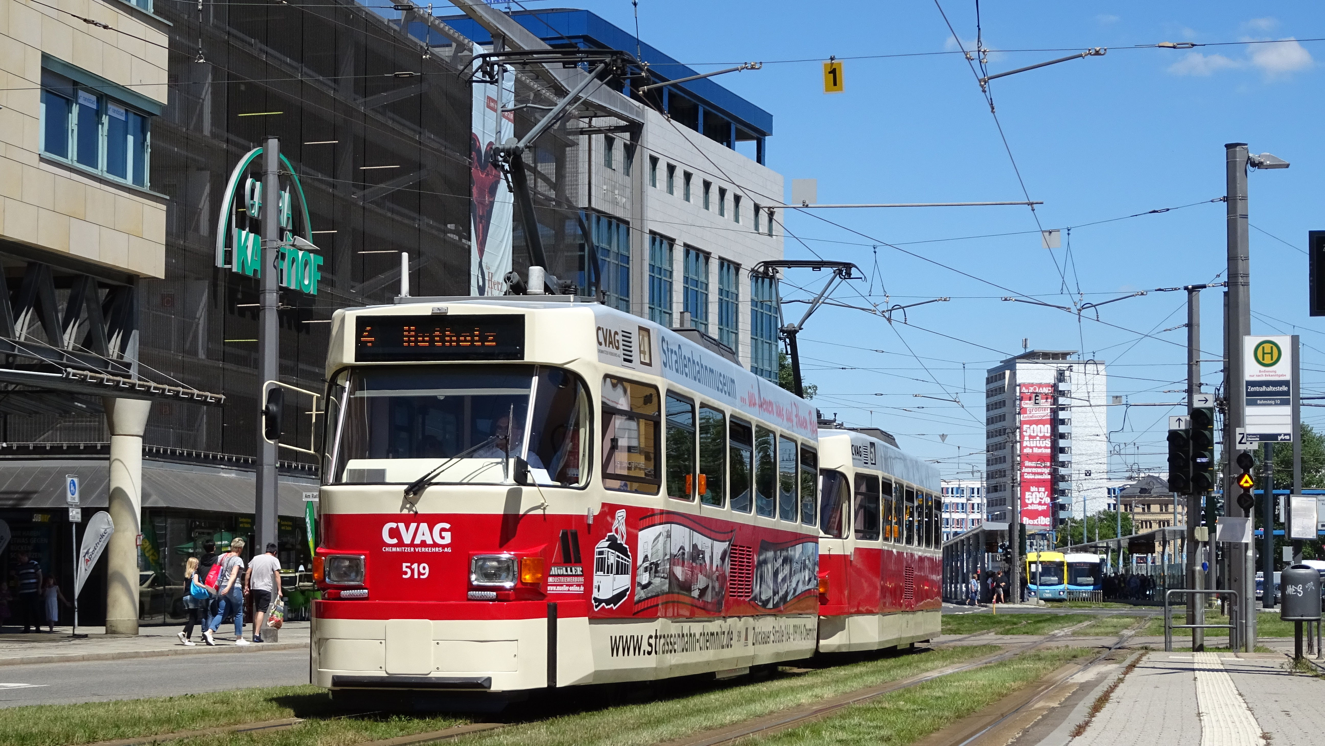 Tatra T3D-M Wagen 519 und 509 auf der Linie 4 kurz nach der Zentralhaltestelle.